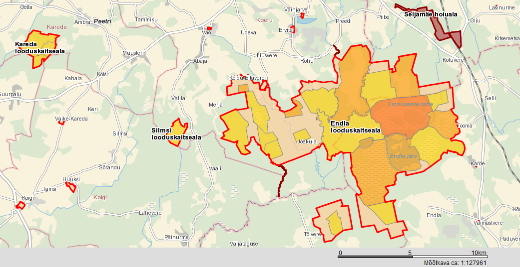 Endla, Silmsi ja Kareda looduskaitsealad Maa-ameti kaardil.